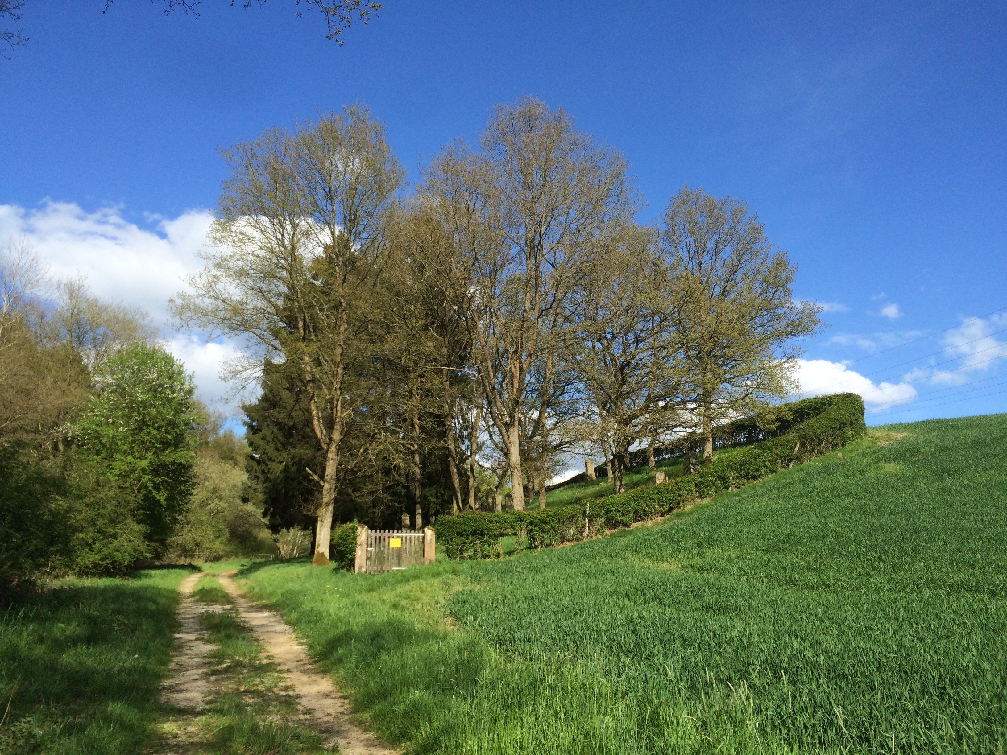 Denkmalzone Jüdischer Friedhof Rheinböllen - Gesamtansicht